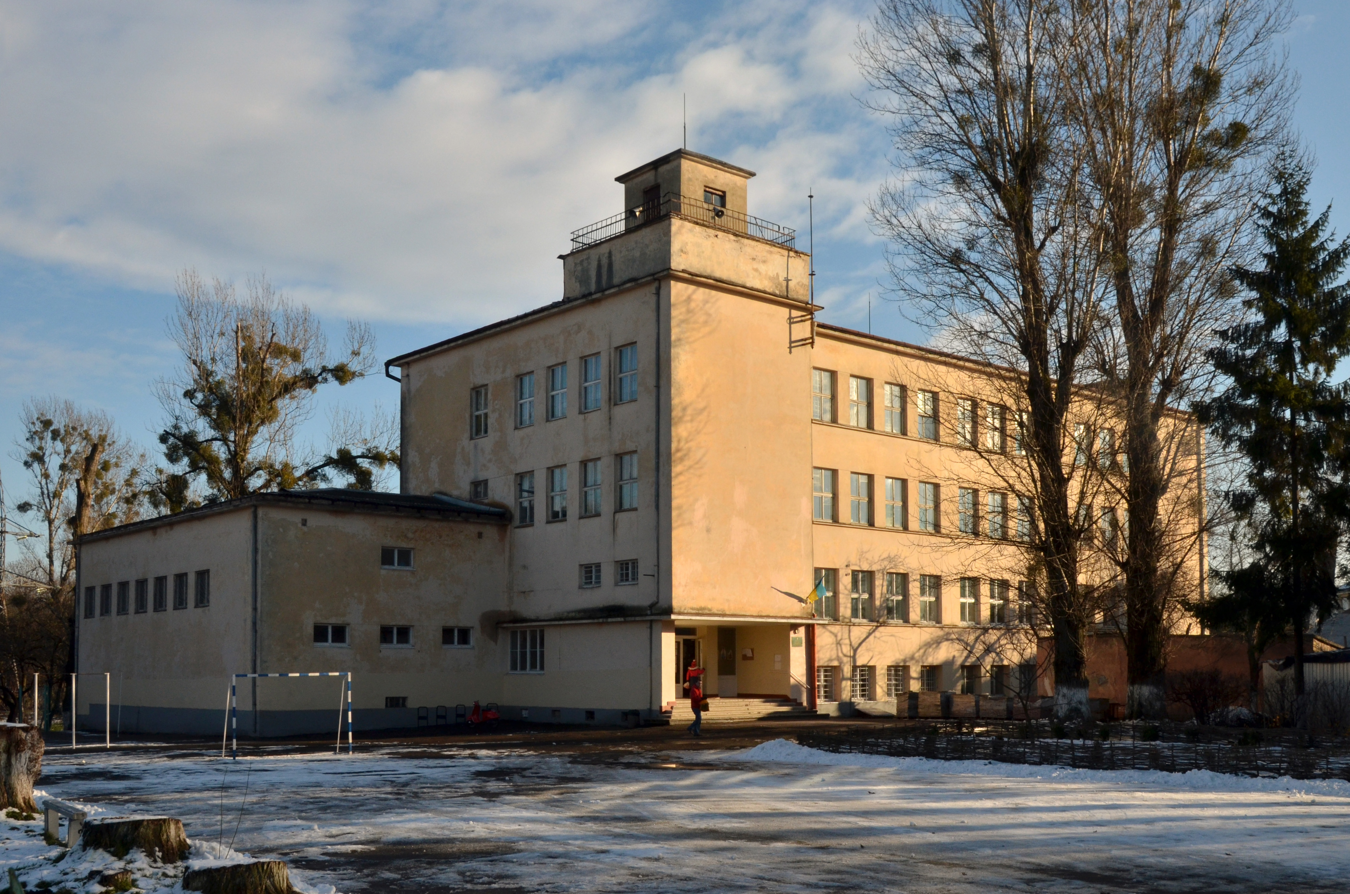 Будинок № 132a на вулиці Замарстинівській у Львові. Збудований 1938 року за проектом Адама Козакевича.